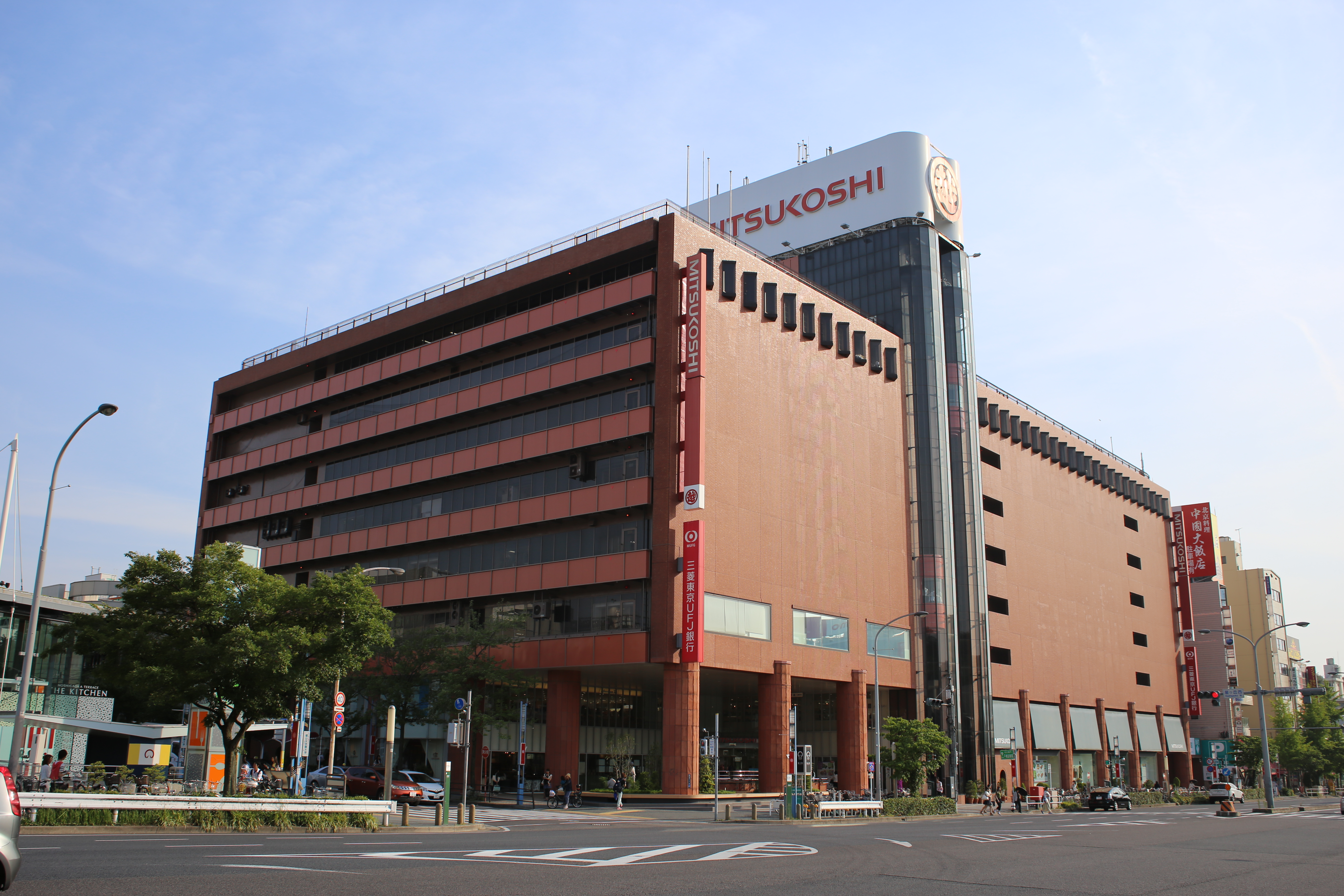 名古屋市千種区星が丘元町の星ヶ丘三越を北側公道東側より撮影